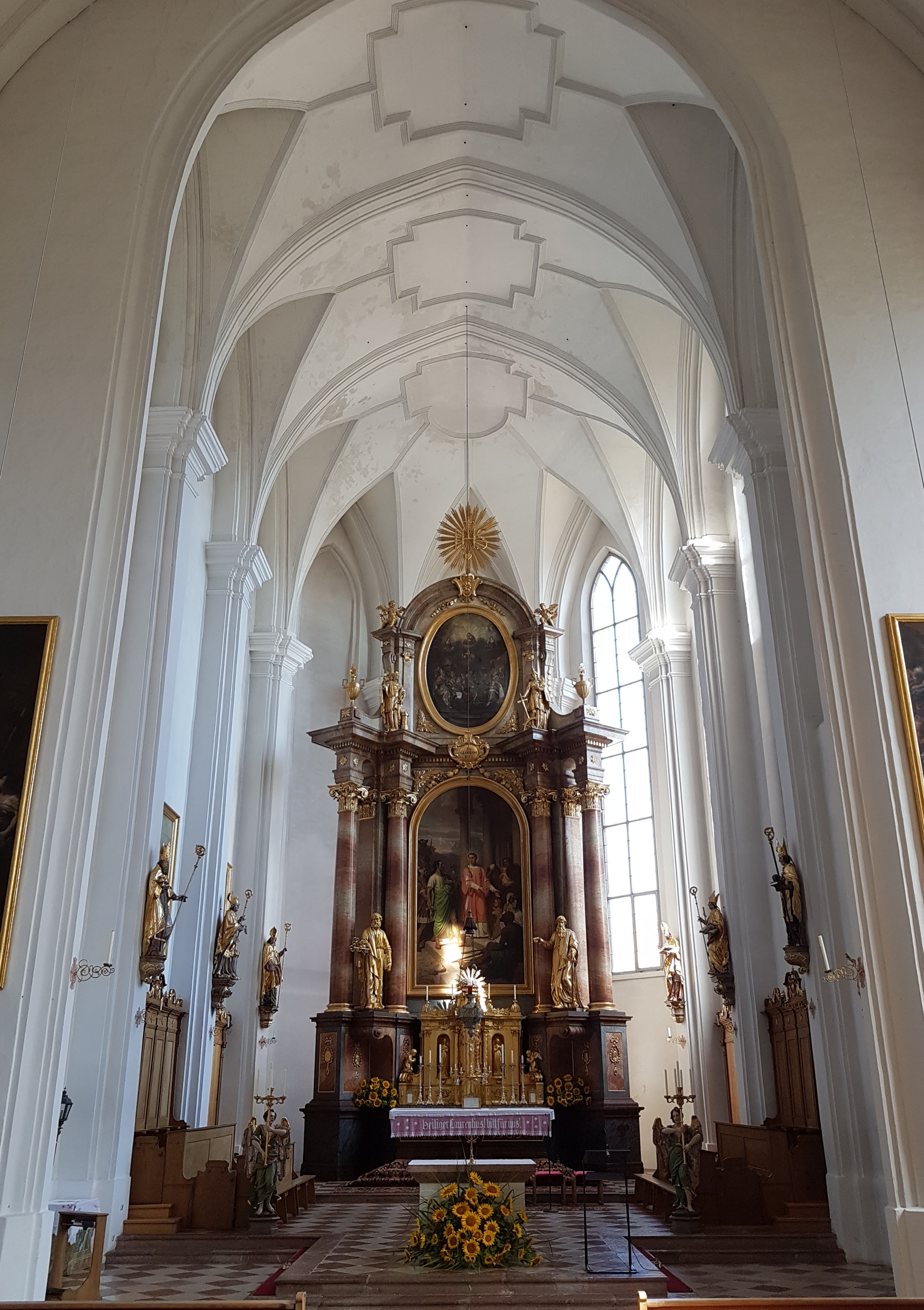 St. Laurentius (Tittmoning)